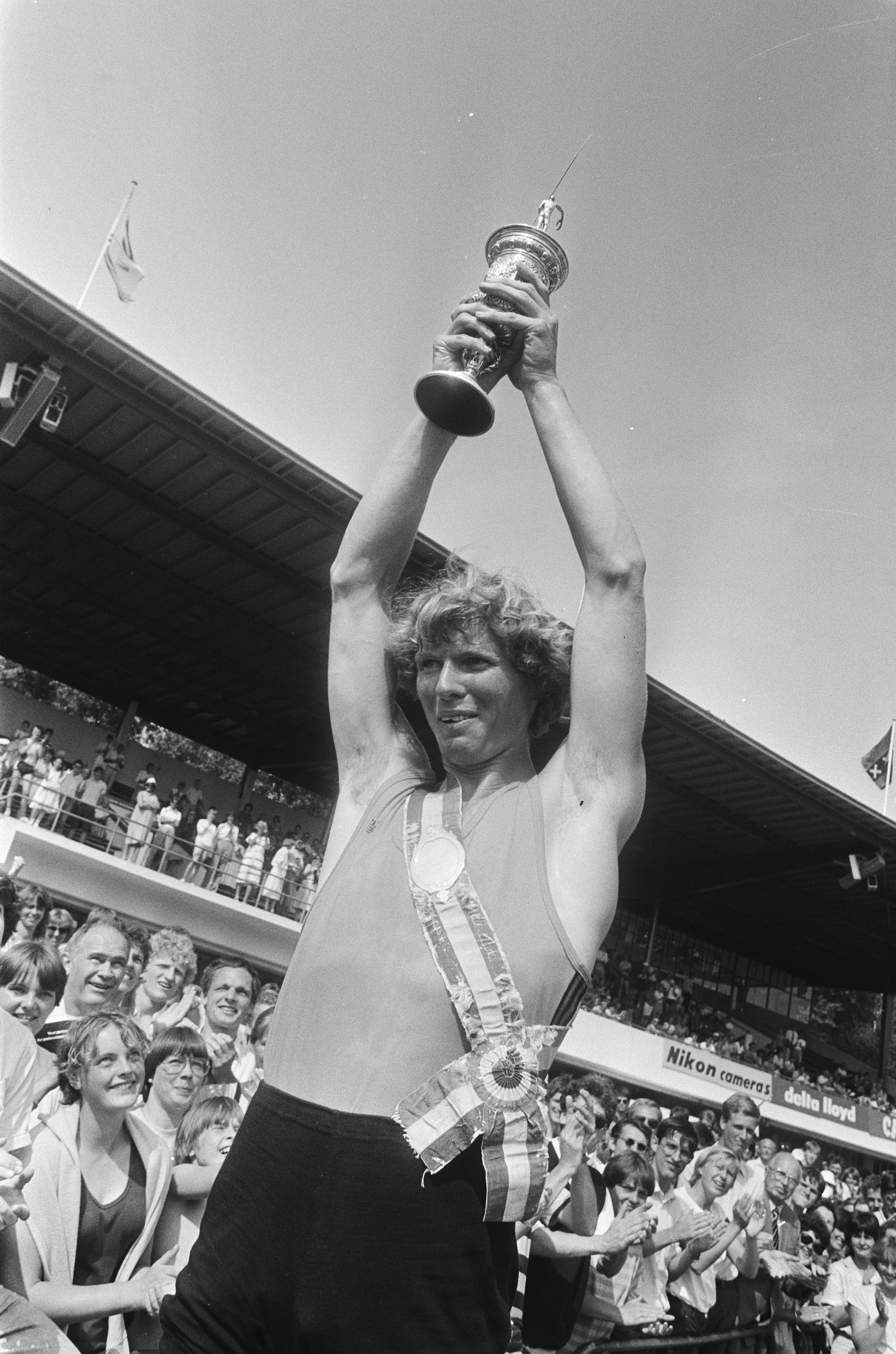 Collectie / Archief : Fotocollectie Anefo Reportage / Serie : Roeien om de Holland Beker op de Bosbaan in het Amsterdamse Bos Beschrijving : Skiffeur Ronald Florijn met beker Datum : 26 juni 1983 Locatie : Amsterdam, Noord-Holland Trefwoorden : roeien, wedstrijden Persoonsnaam : Florijn, Ronald Fotograaf : Bogaerts, Rob / Anefo Auteursrechthebbende : Nationaal Archief Materiaalsoort : Negatief (zwart/wit) Nummer archiefinventaris : bekijk toegang 2.24.01.05 Bestanddeelnummer : 932-6331